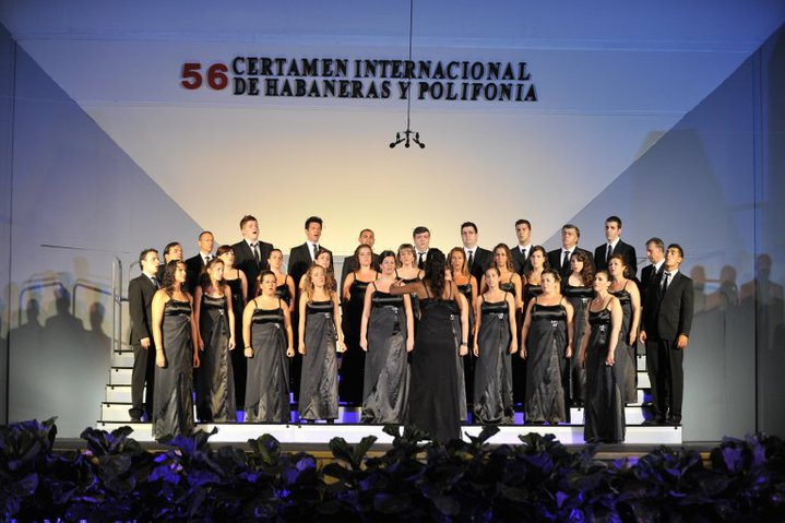 Actuación del Coro Maestro Casanovas en el Certamen Internacional de Habaneras y Polifonía de Torrevieja